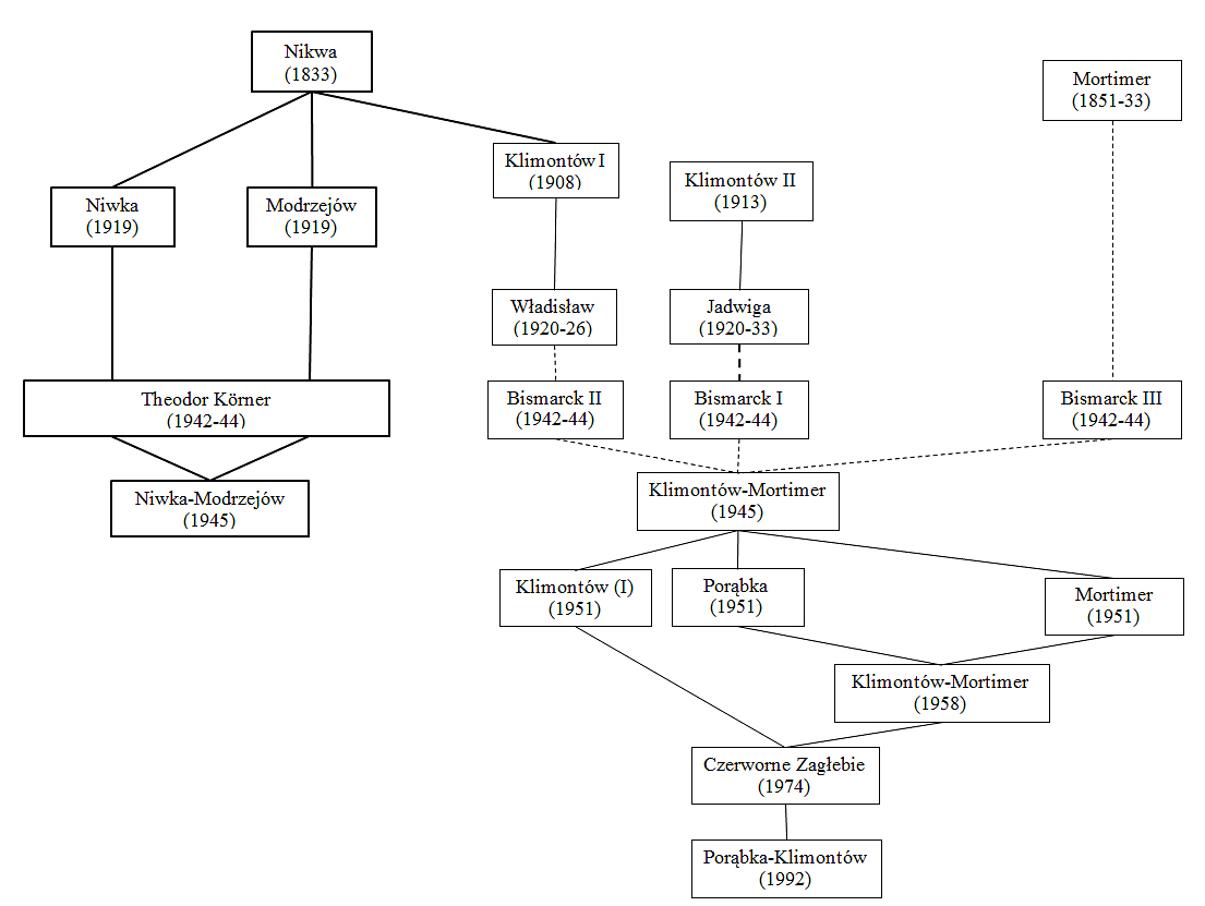 Fusionen und Abspaltungen der Bergwerke Niwka und Modrzejow